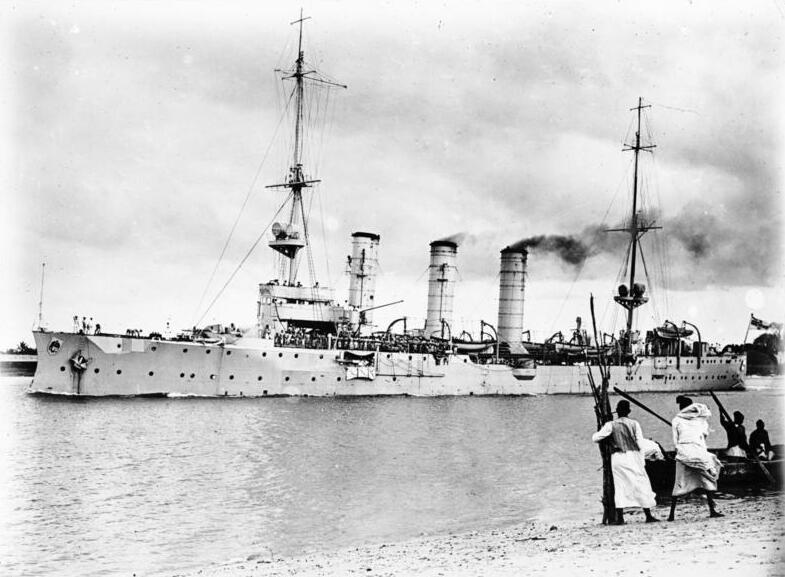 Kreuzer Königsberg zerschossen